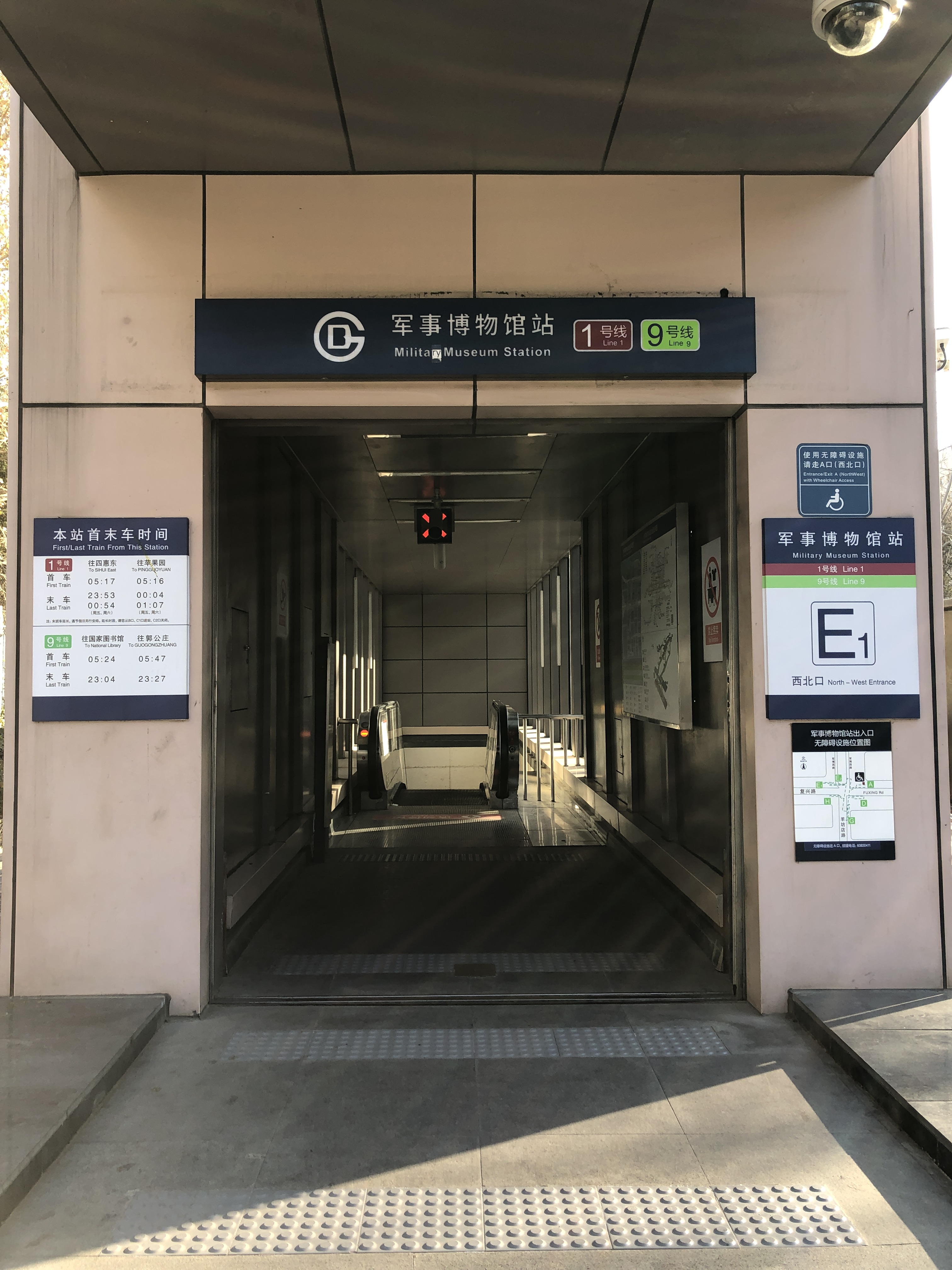 中文（中国大陆）: 北京地铁军事博物馆站E1口